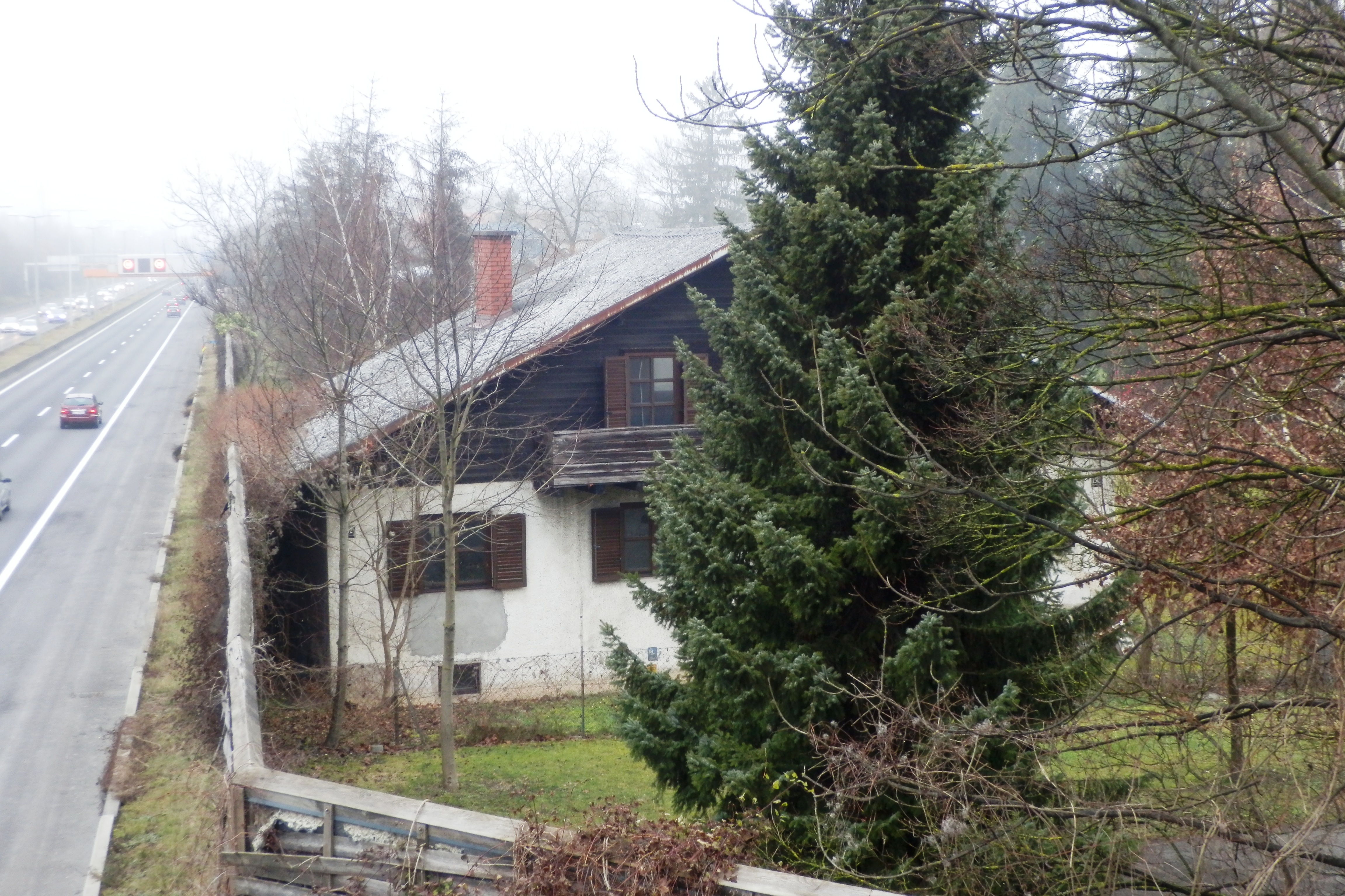 Stadtrandsiedlung Schörgenhub, Linz, Dauphinestraße, Mühlkreisautobahn A7